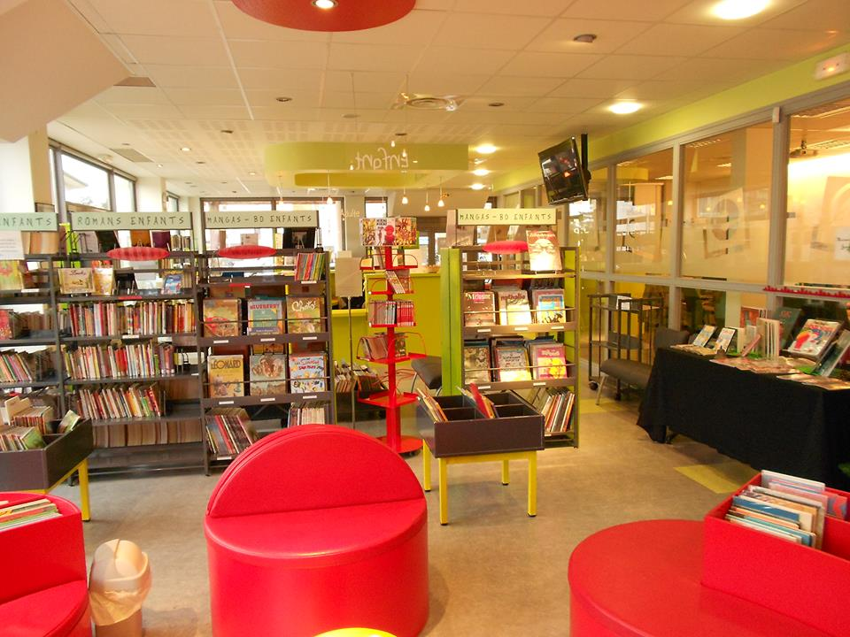 L'espace jeunesse de la médiathèque de Saint-Etienne-du-Bois